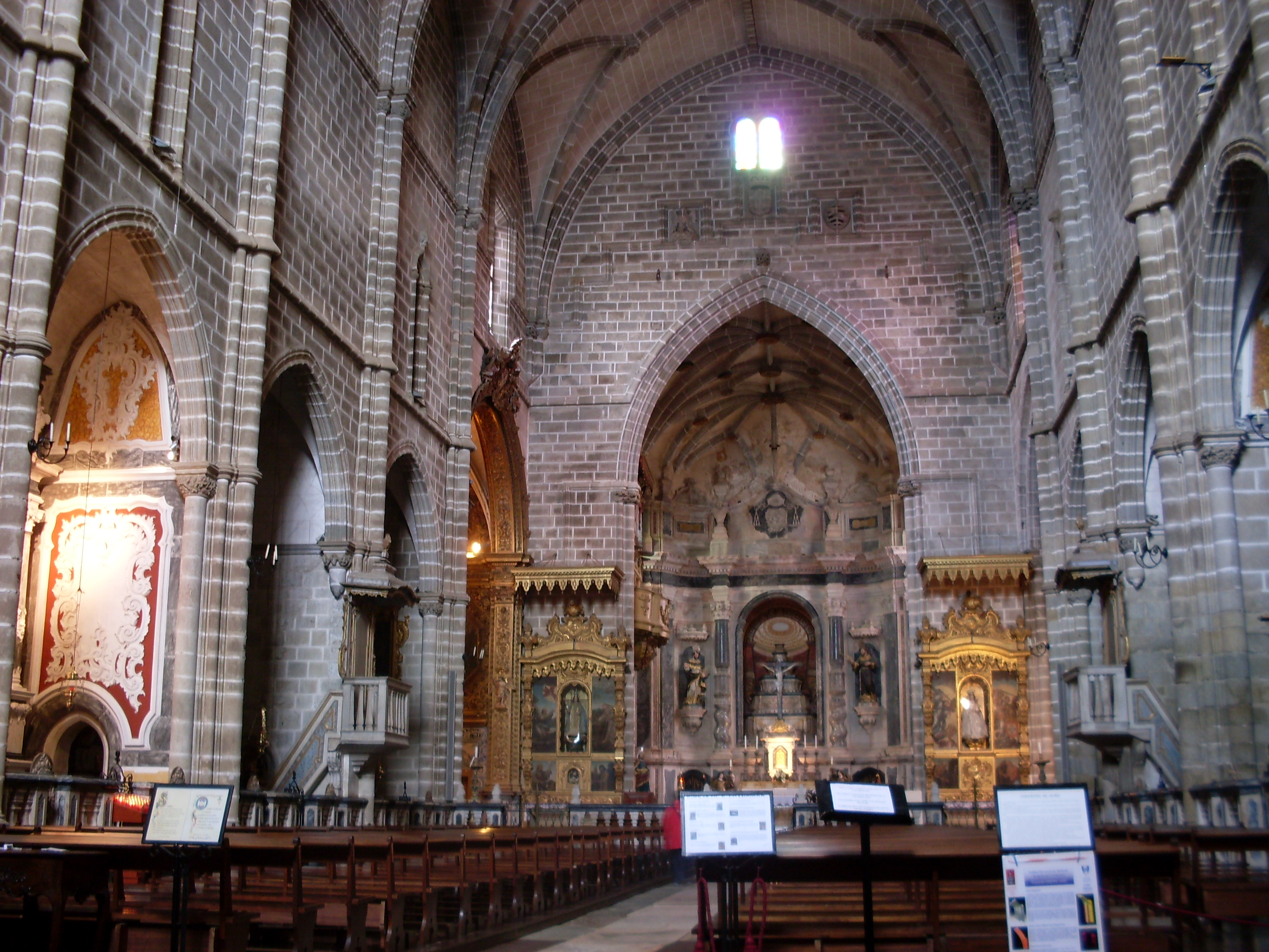 Interior da Igreja de São Francisco, Évora